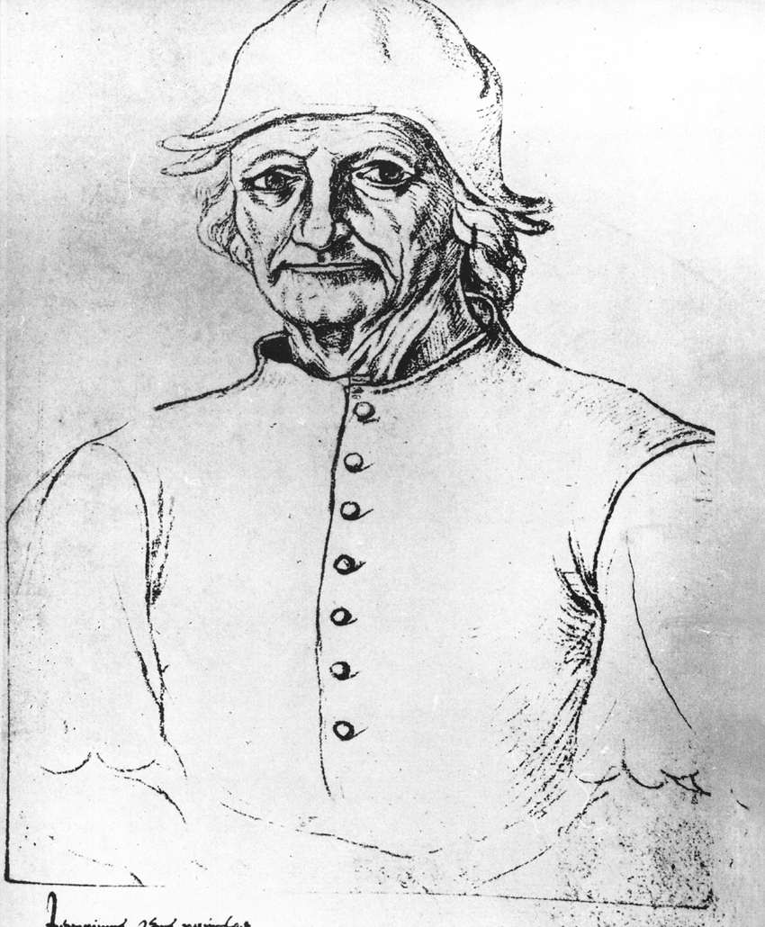 From the Recueil d’Arras (Arras, Bibliothèque Municipale, ms. 266, fol. 275), see Category:Recueil d’Arras